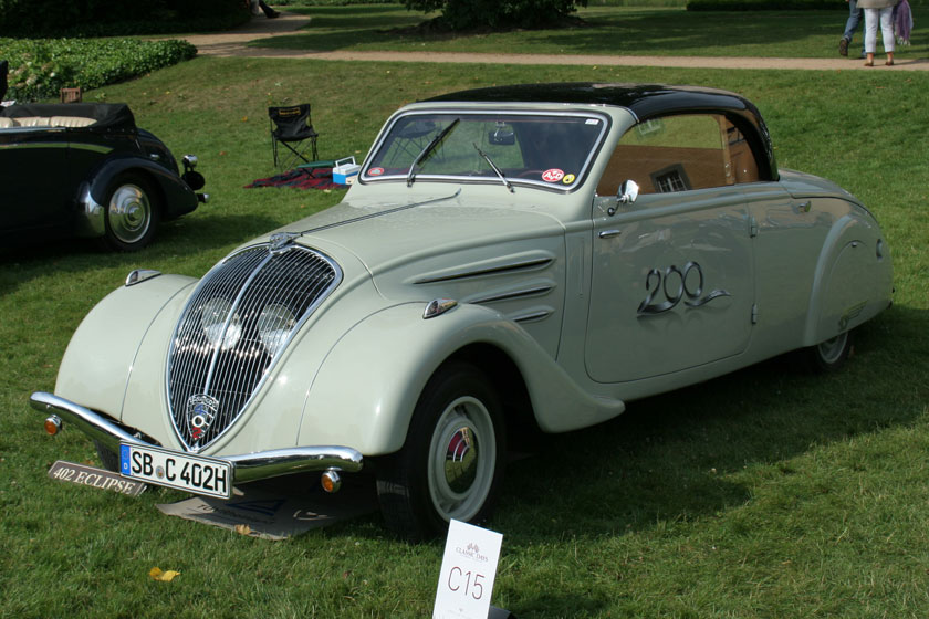 1938 Peugeot 402 L E4Y